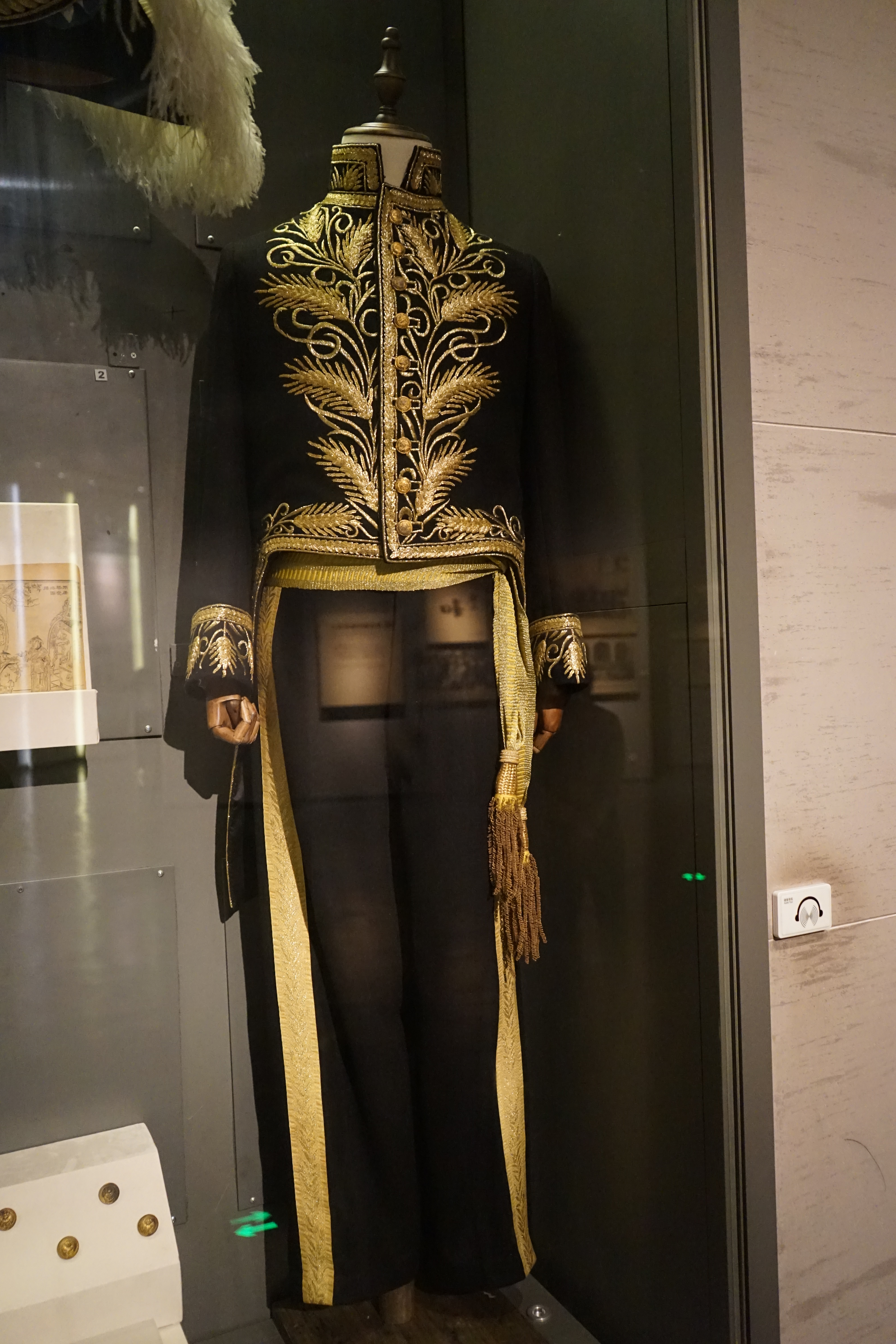 中文（中国大陆）: 民国魏宸组外交公使礼服复制品，辛亥革命博物馆第四展厅。魏宸组之孙魏崇明提供